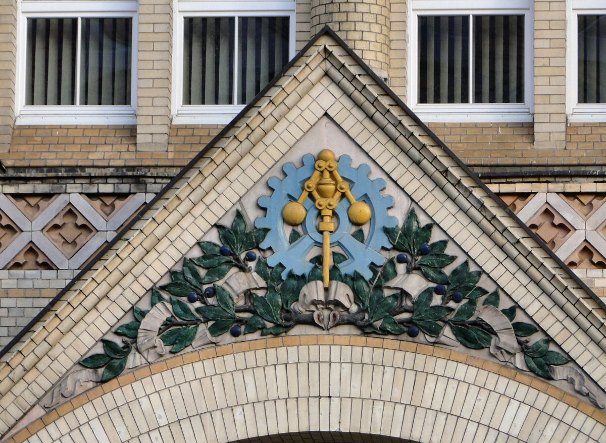 Wizerunek regulatora Watta na gmachu Wydziału Elektrycznego ZUT przy ul. Sikorskiego w Szczecinie (pierwotnie była tu Wyższa Szkoła Budowy Maszyn)